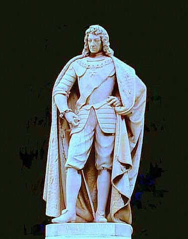 Monument